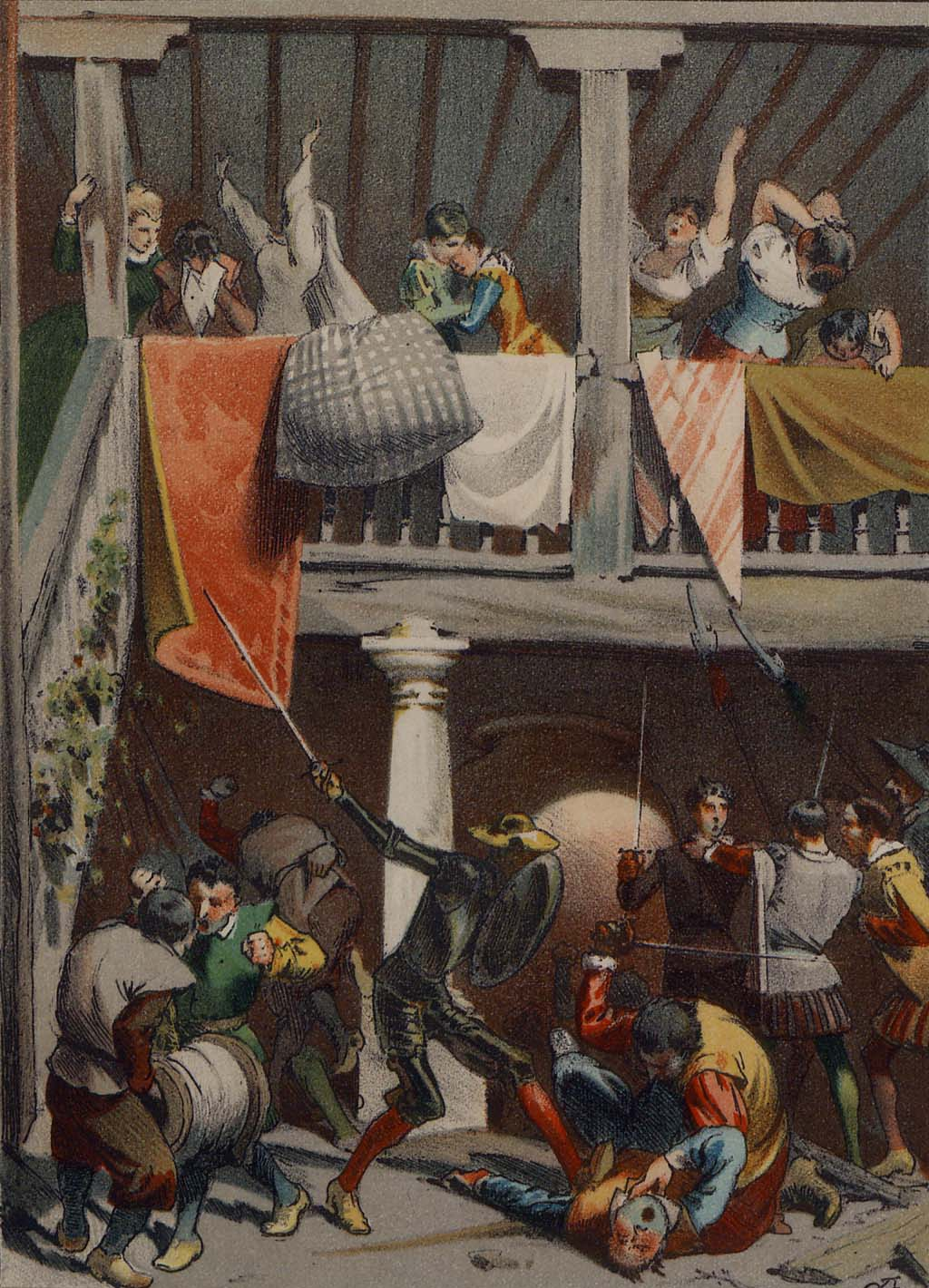 Toda la venta eran llantos, voces, gritos...